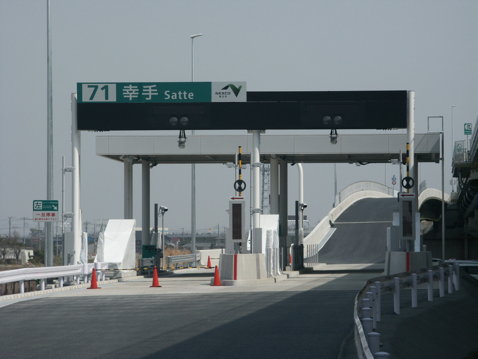 首都圏中央連絡自動車道幸手インターチェンジ料金所（五霞方面側入口料金所を撮影）